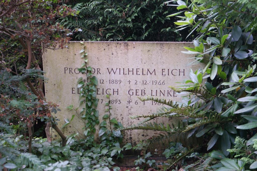 Grab des Betriebswirts und Politikers Wilhelm Karl Eich (1889-1966) auf dem Waldfriedhof in Bad Homburg v. d. Höhe.